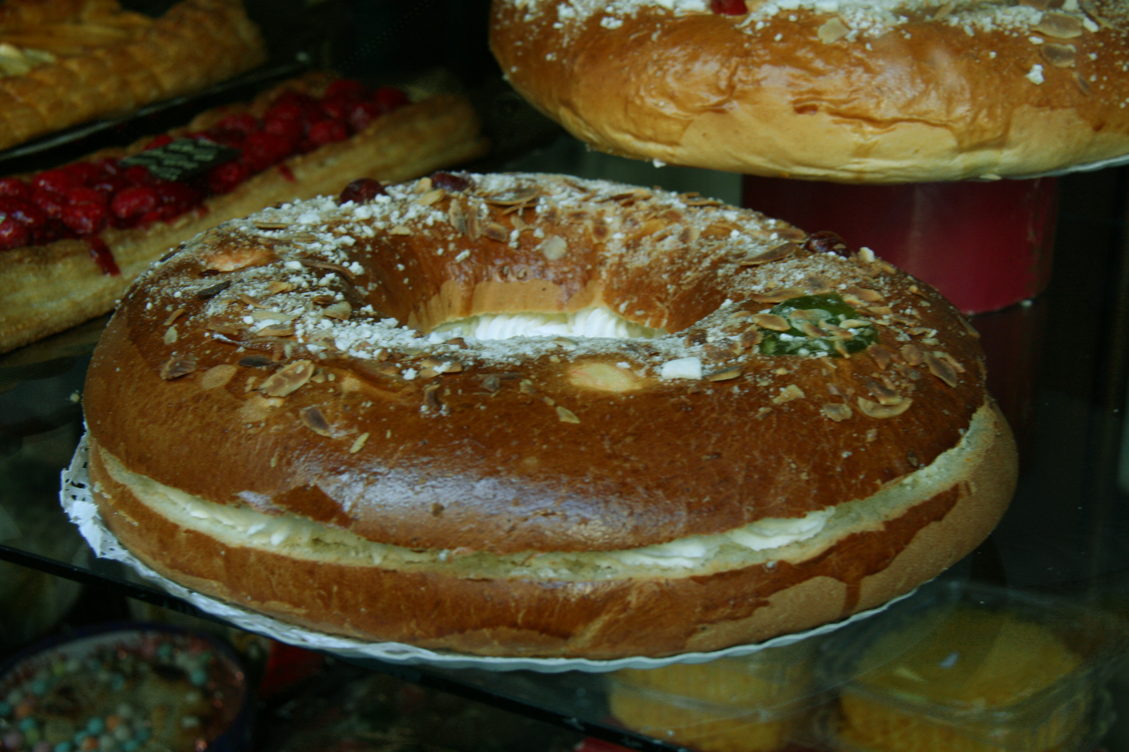 Roscón de Reyes (con nata) - El Riojano - MAdrid